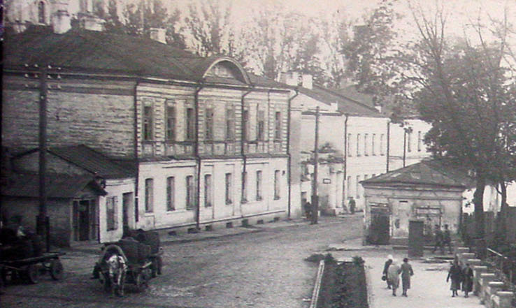 Беларуская (тарашкевіца): Магілёў (Mahiloŭ), вуліца Шляхецкая (vulica Šlachieckaja). Сквэр